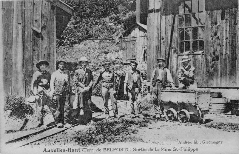 Sortie de la mine Saint-Philippe à Auxelles-Haut.